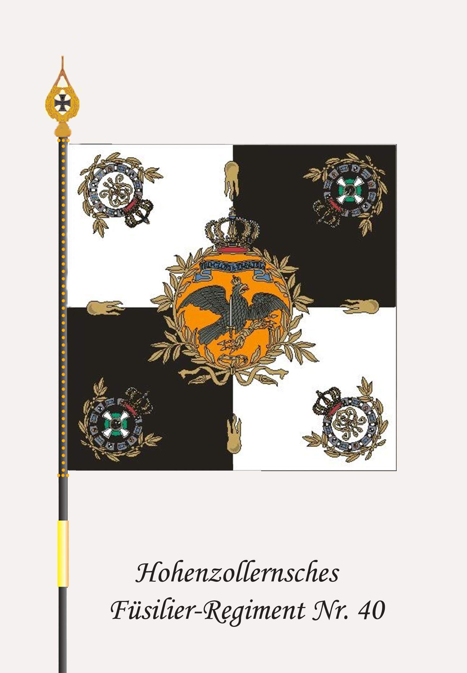 Fahne des Füsilier-Regimentes Fürst Karl Anton von Hohenzollern (Hohenzollernsches) Nr. 40